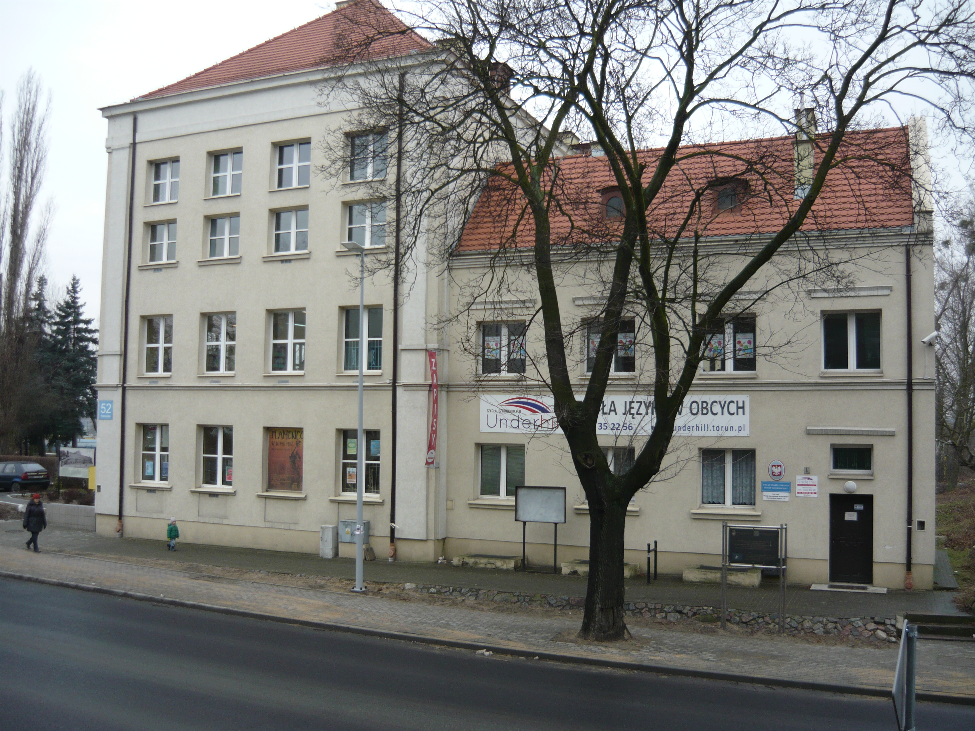 Budynek filii Domu Muz przy ul. Poznańskiej na Podgórzu w Toruniu